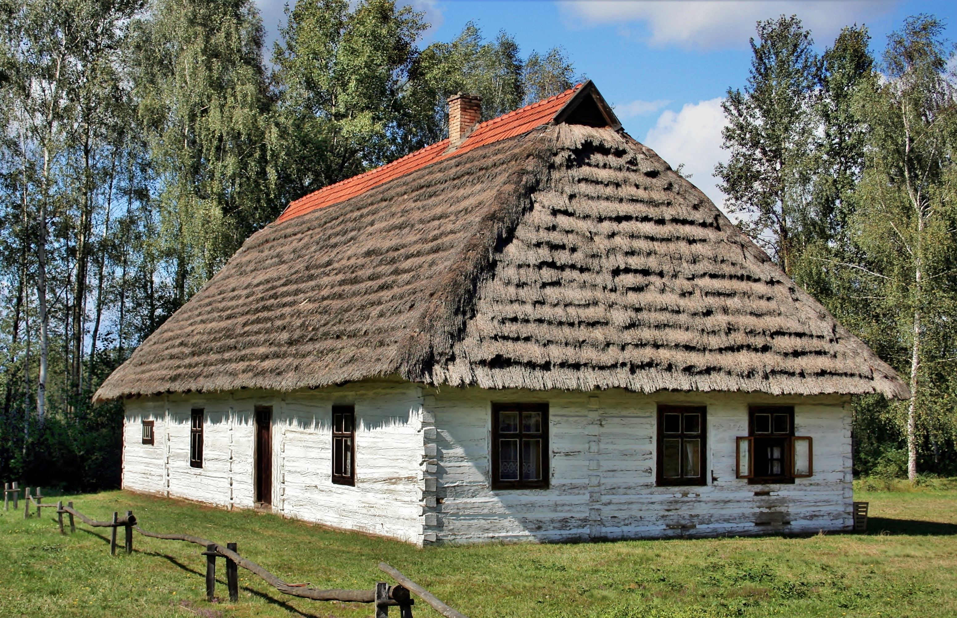 Muzeum Kultury Ludowej w Kolbuszowej. Chałupa z Budziwoja